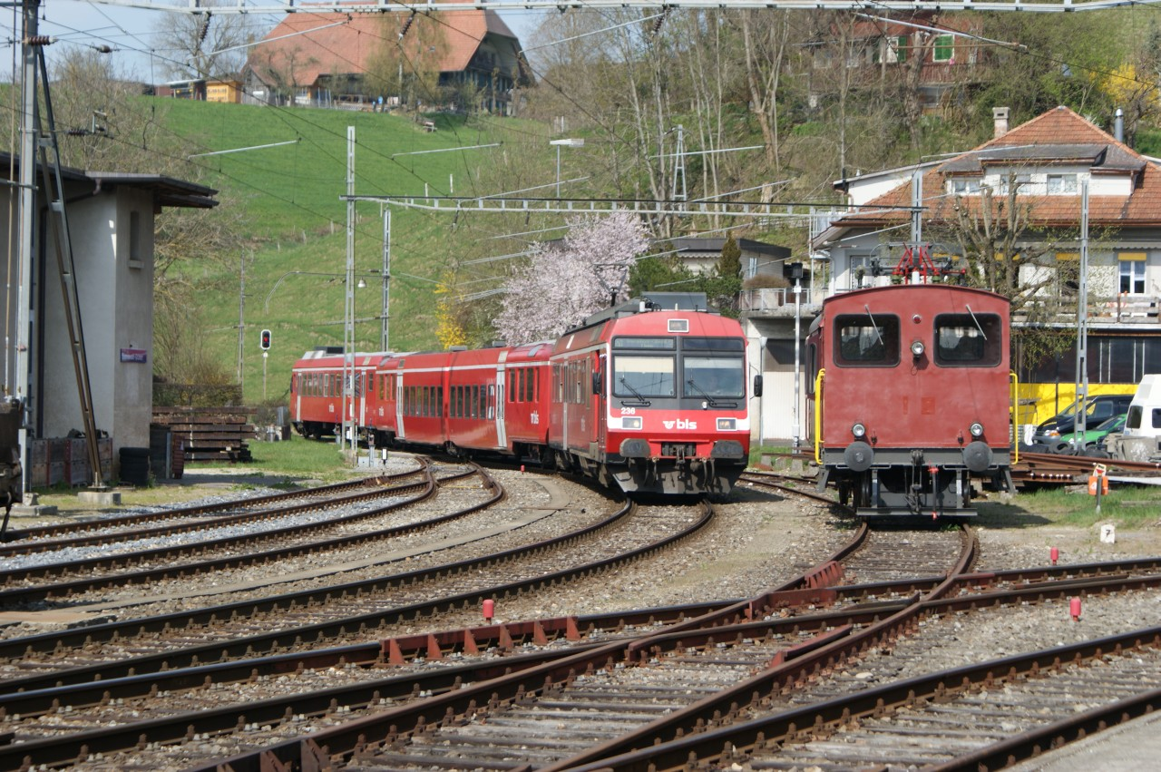 Bahnhof Sumiswald-Grünen im Emmental, Einfahrt der S4 von Affoltern-Weier im letzten Betriebsjahr dieses Linienabschnitts